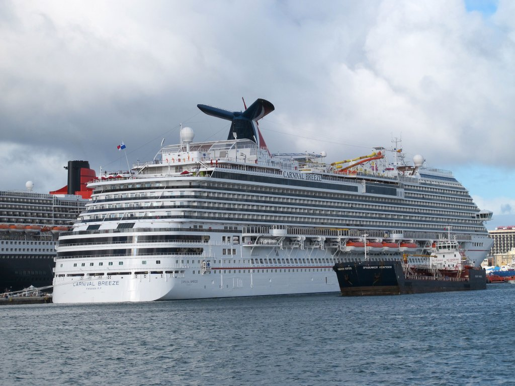 El Carnival Breeze atracó ayer por primera y quizás única vez en el puerto de La Luz y de Las Palmas en Gran Canaria Islas Canarias. En junio de este año salió de los astilleros Fincatieri (Italia) para estrenarse con una campaña de verano por el Mediterráneo. Ahora se dirige a su puerto base en Miami, desde donde operará en distintos circuitos por el continente americano. Antes de llegar a la capital de Gran Canaria partió con sus 3.670 pasajeros norteamericanos desde Barcelona, con escalas en Palma de Mallorca, Málaga y ahora Las Palmas, para salir por la tarde hacia Antigua, adonde llegará el 17 de noviembre, Saint Martin y Miami tres días después.El Breeze es el más moderno de los barcos de la Carnival Cruise Line, la mayor empresa del sector y propietaria de Costa Cruceros,en la planta 5 que, con la 10, es donde se concentran las áreas de ocio. En ella se suceden las tiendas, el casino y los restaurantes temáticos. La Cucina del Capitano (italiano), Bonsai Sushi (japonés), Farenheith 555 (Asador premium), Red Frog (pub caribeño), Guy's Burguer Joint (hamburguesas), además del rincón de comida Tandoori (India) y la pizzería. Lo que más destaca de esta zona es su cubierta exterior, mucho más amplia, lo que le permite ofrecer que algunos de sus bares y pubs cuenten con terrazas al aire libre.el barco más moderno de la Carnival es al gusto del cliente estadounidense. Su planta 10 acoge una amplia gama de restaurante bufé, piscina con pantallón gigante, un circuito de media milla para correr y un parque acuático, entre otras áreas de ocio. Fuente información : Más información : Fotografías